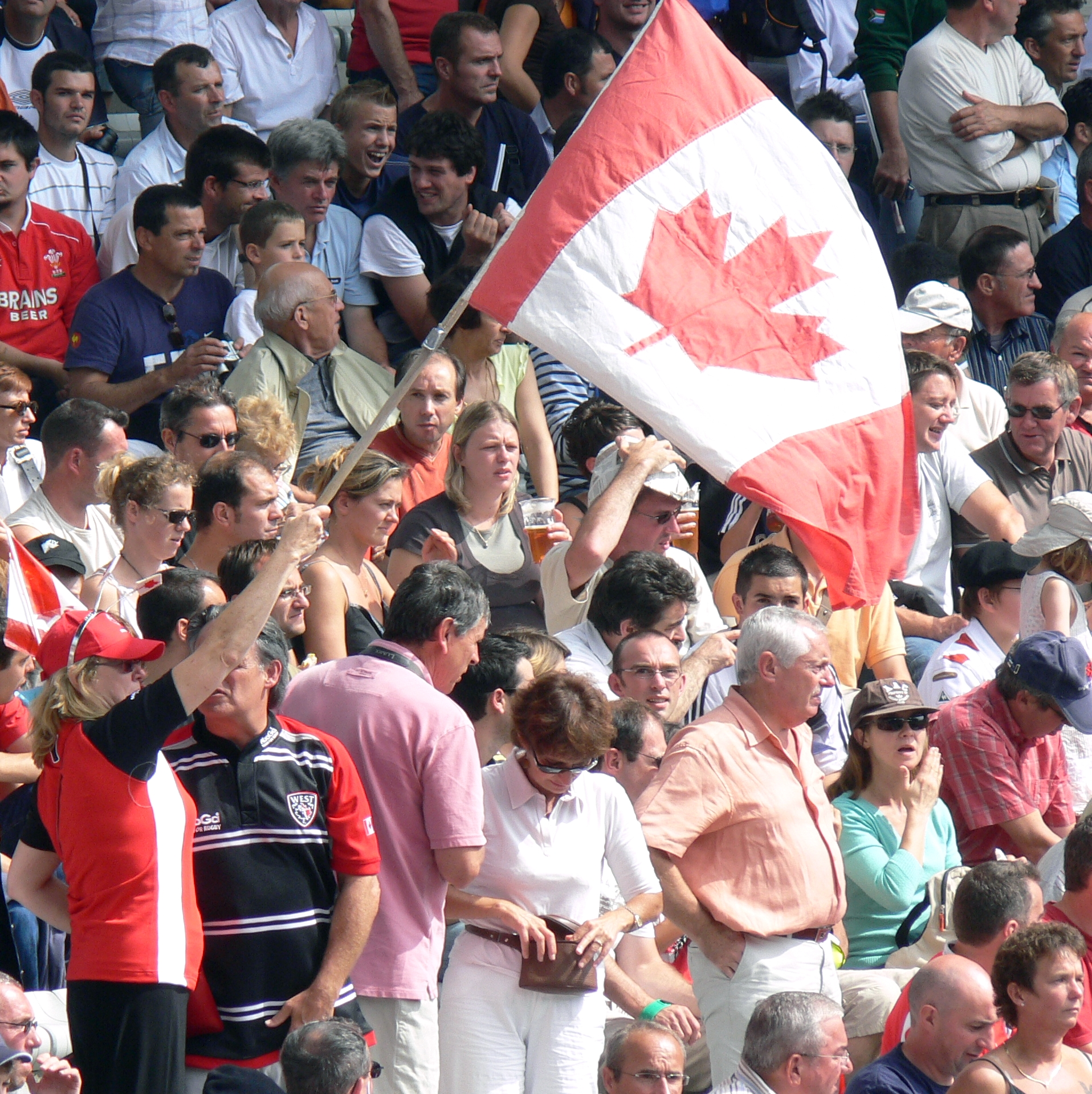 Canada 's flag 9 sept - Wales vs Canada